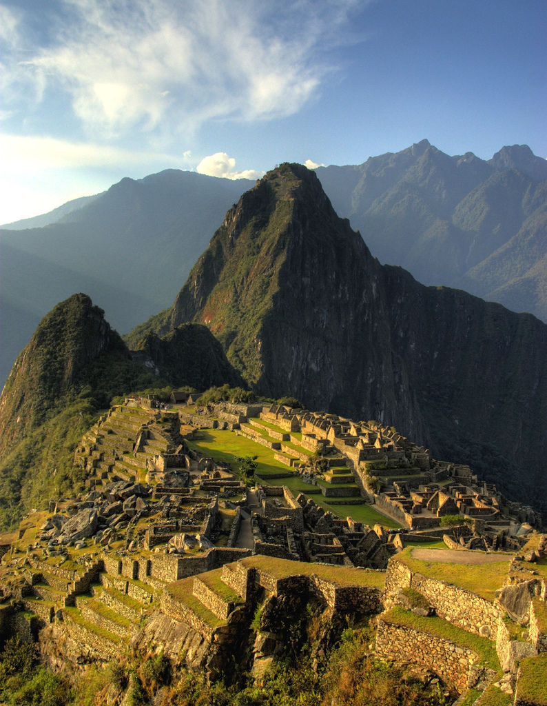 Sunset across Machu Picchu